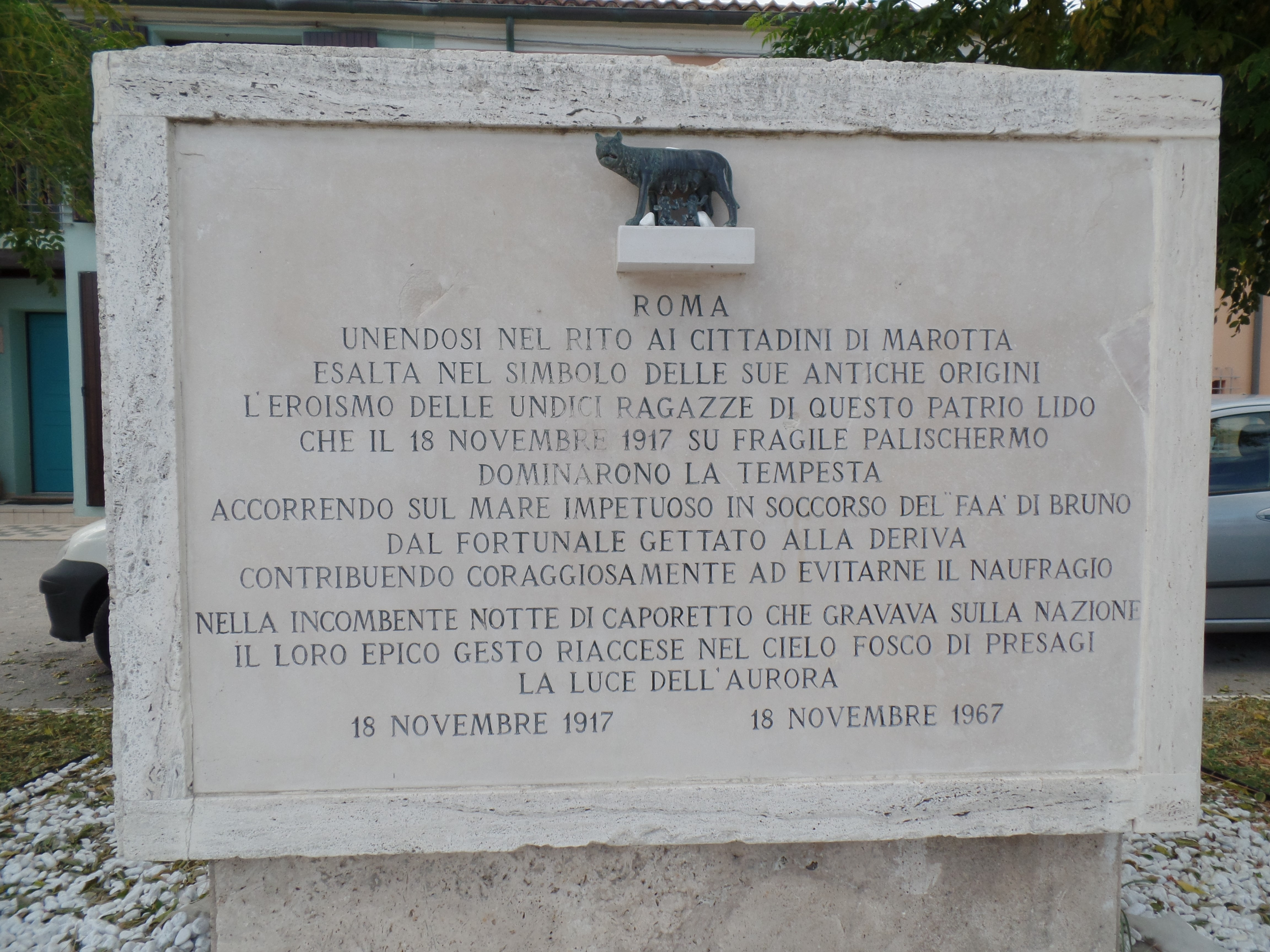 Marotta (Mondolfo) Italia - targa in ricordo delle 11 ragazze eroine del 1917